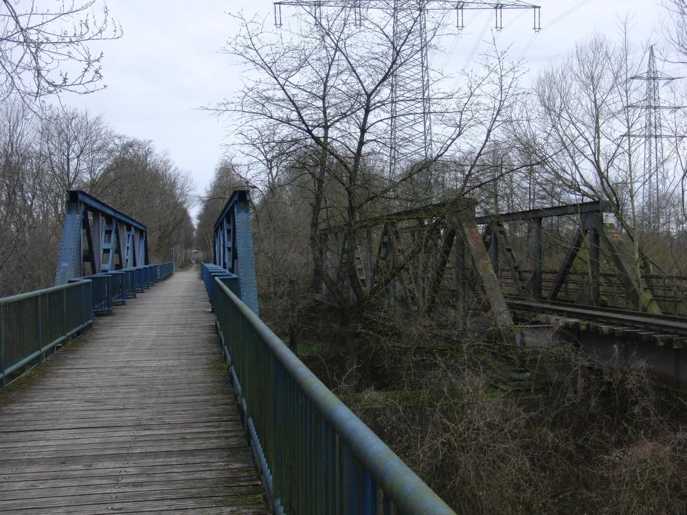 Rurbrücke der ehemaligen DB (Links) und der ehemaligen Jülicher Kreisbahn (rechts) im Jahr 2018